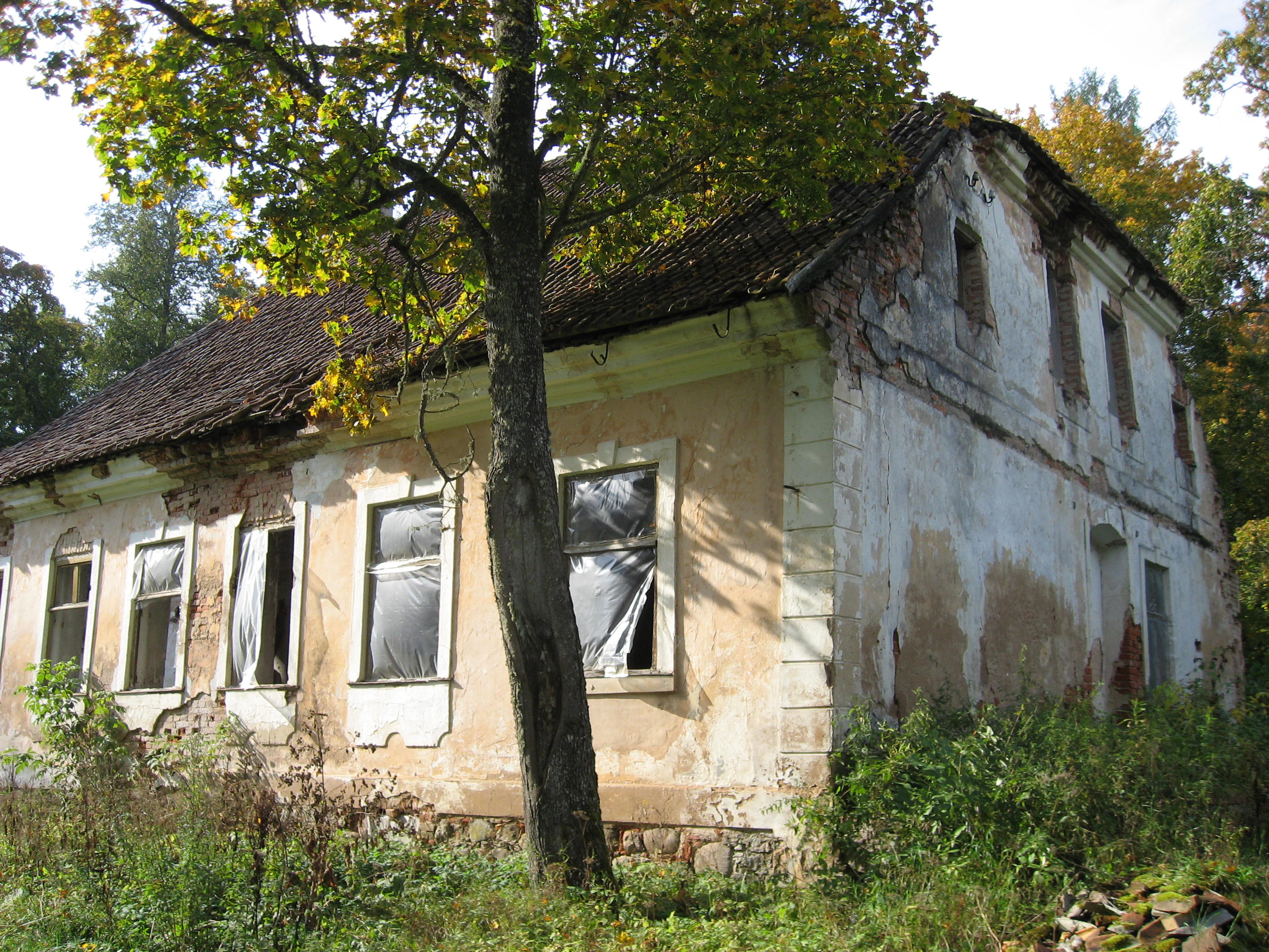 Võro: Joosu mõisa härbän